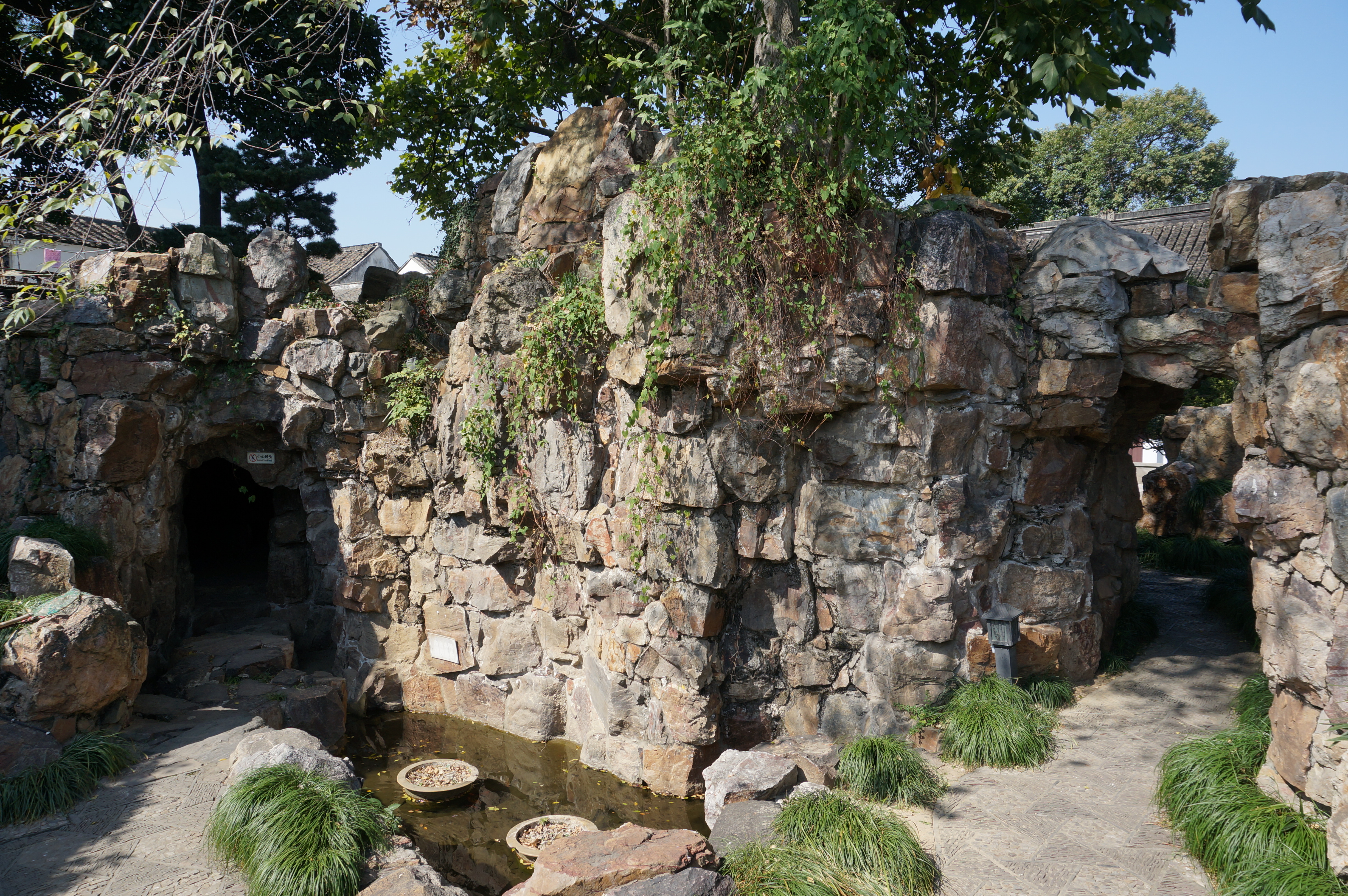 燕园黄石假山，南侧。